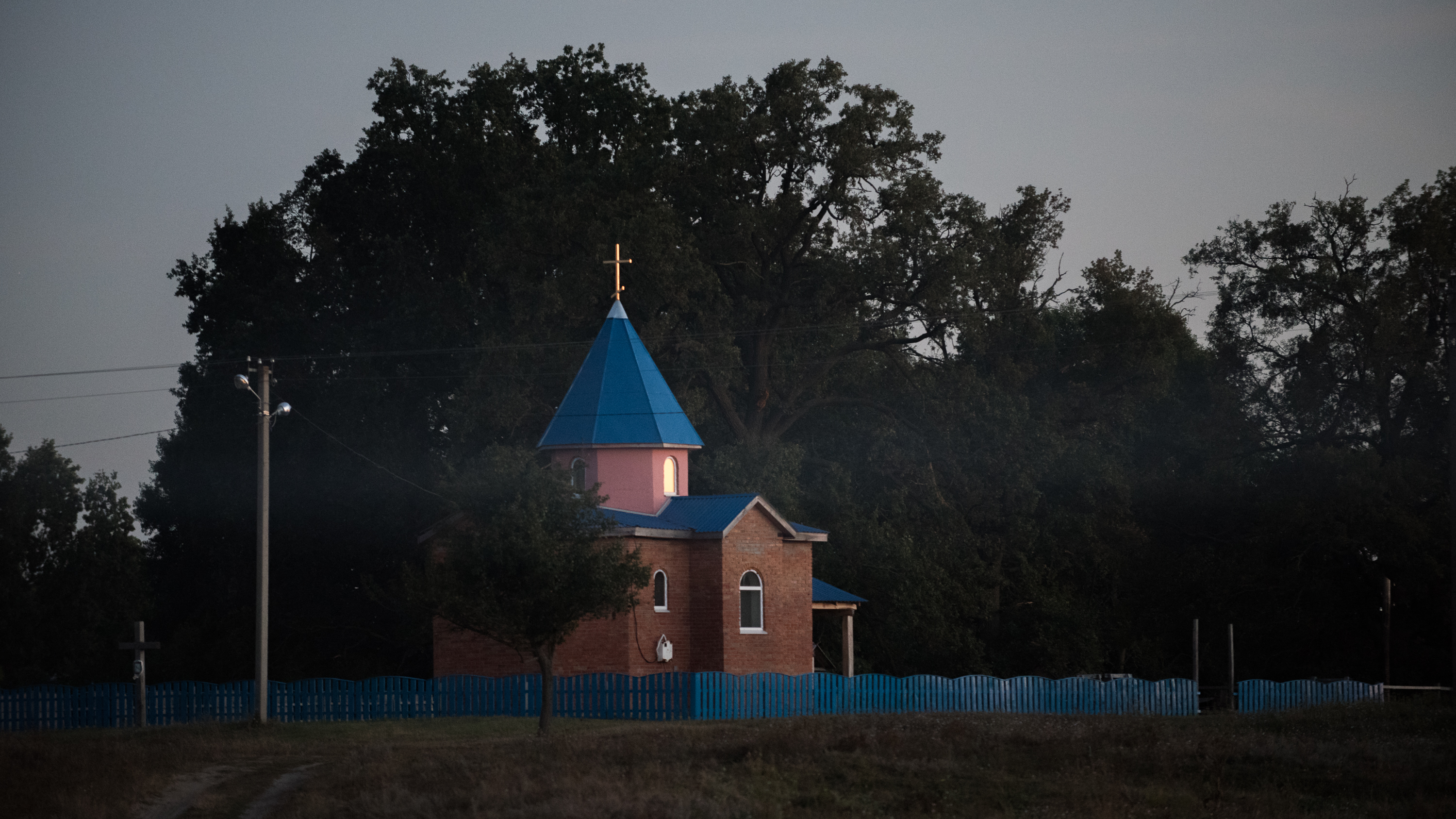 Новозбудована Хрестовоздвиженська церква у Скибинцях Чорнухинського району Полтавської області